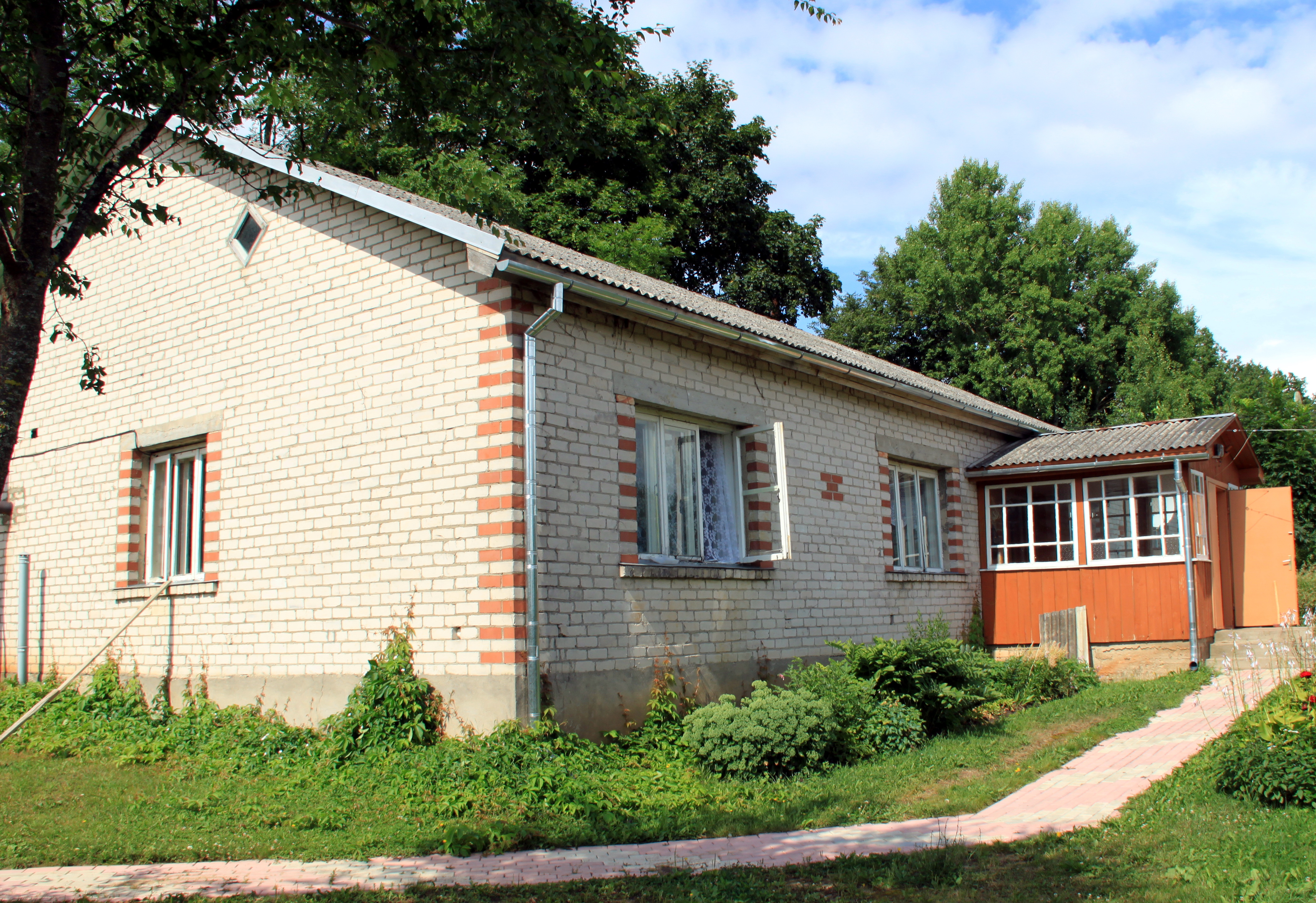 Pļaviņas, ābeļzieds, lotosa māja